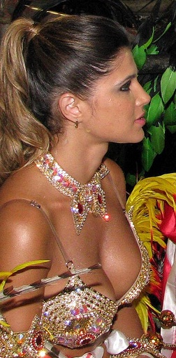 A modelo Danielle Souza no carnaval do Rio de Janeiro em 2010